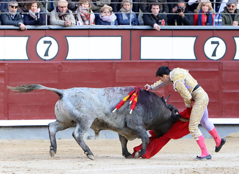 Fotografía donde se puede apreciar al torero Saúl Jiménez Fortes en el transcurso de una de sus faenas.